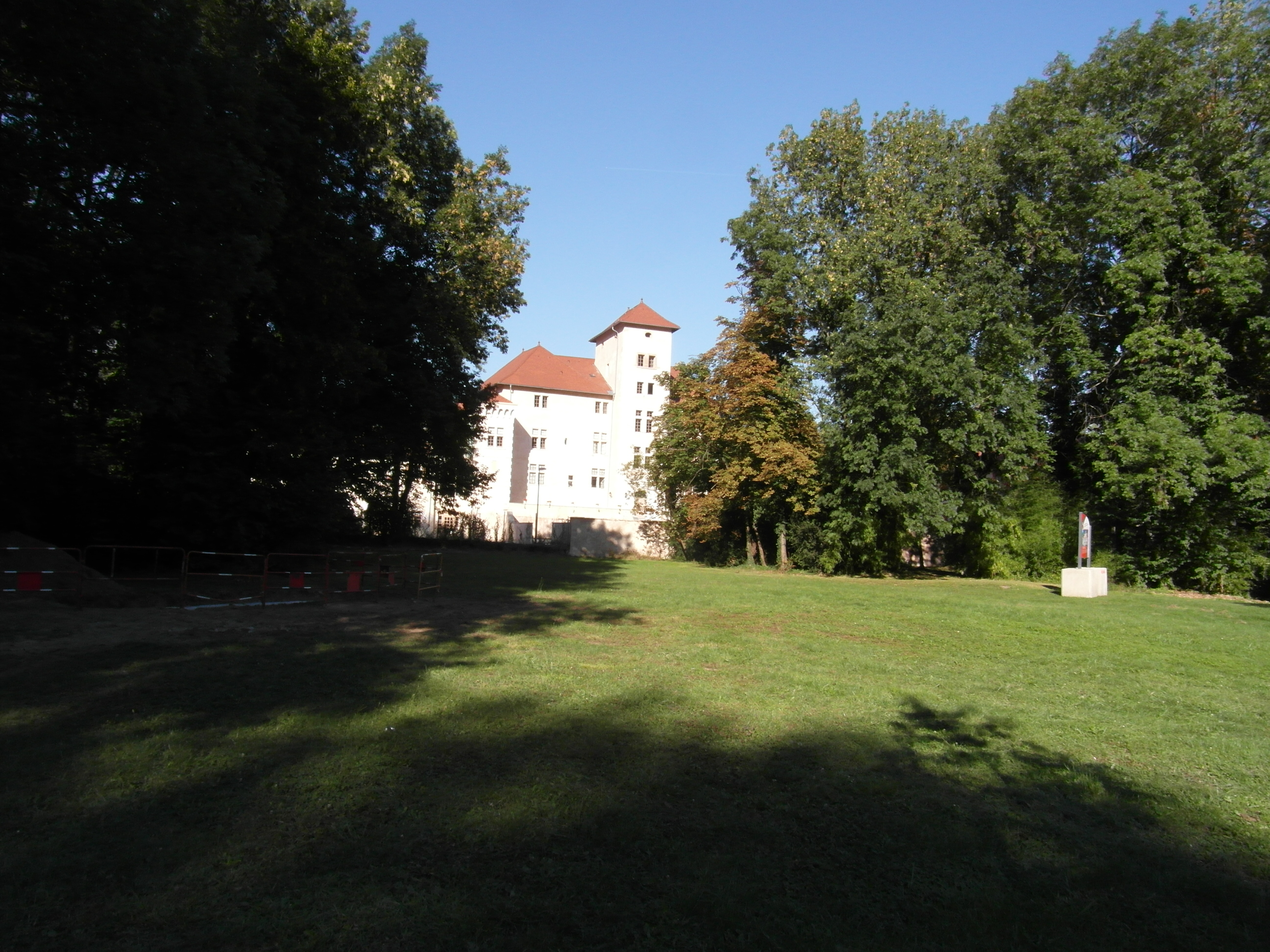 Parc de la Poya chateau de la rochette